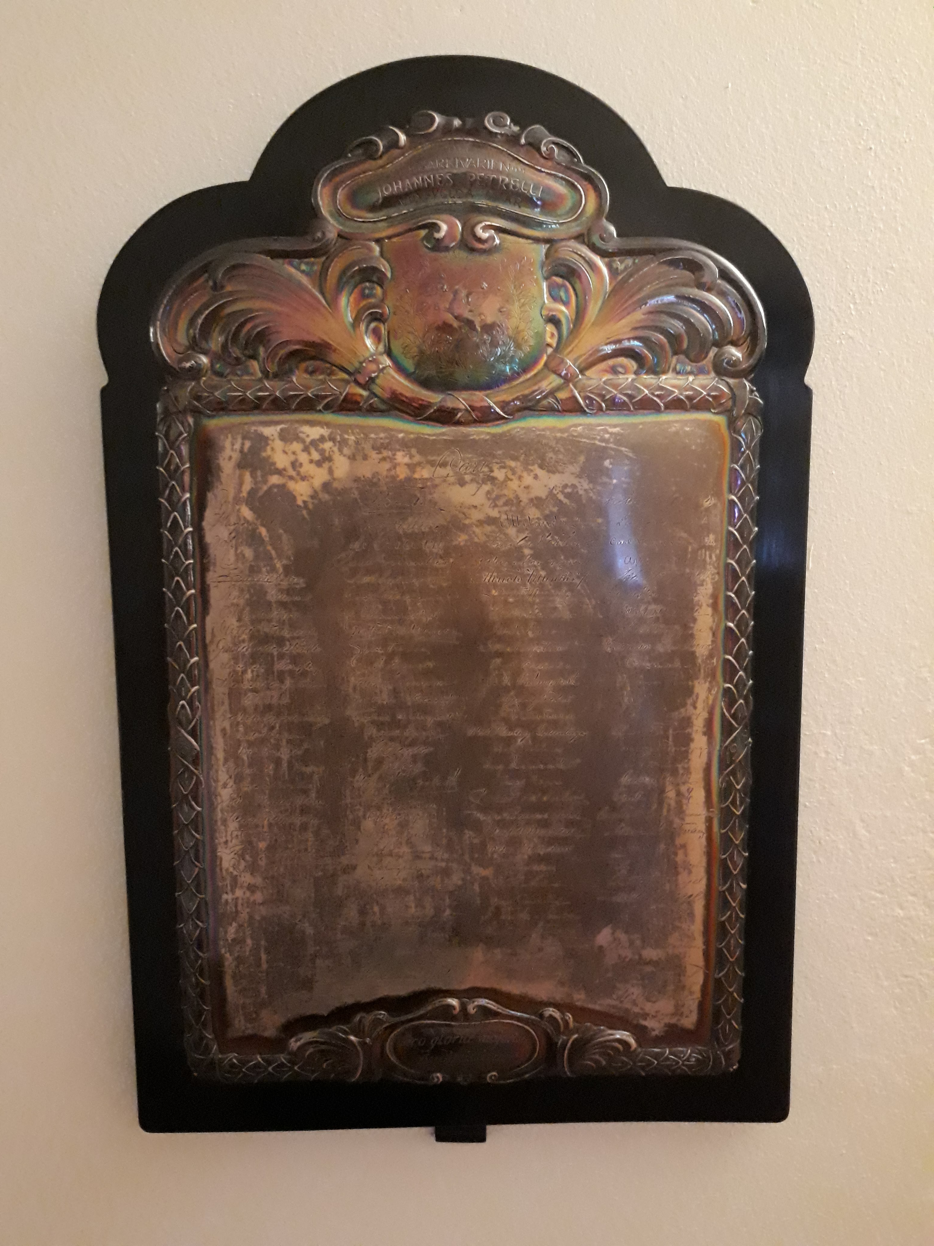 Plakett till minne av krigsarkivarie Johannes Petrellis 65-årsdag. Krigsarkivet, Stockholm, Sverige.